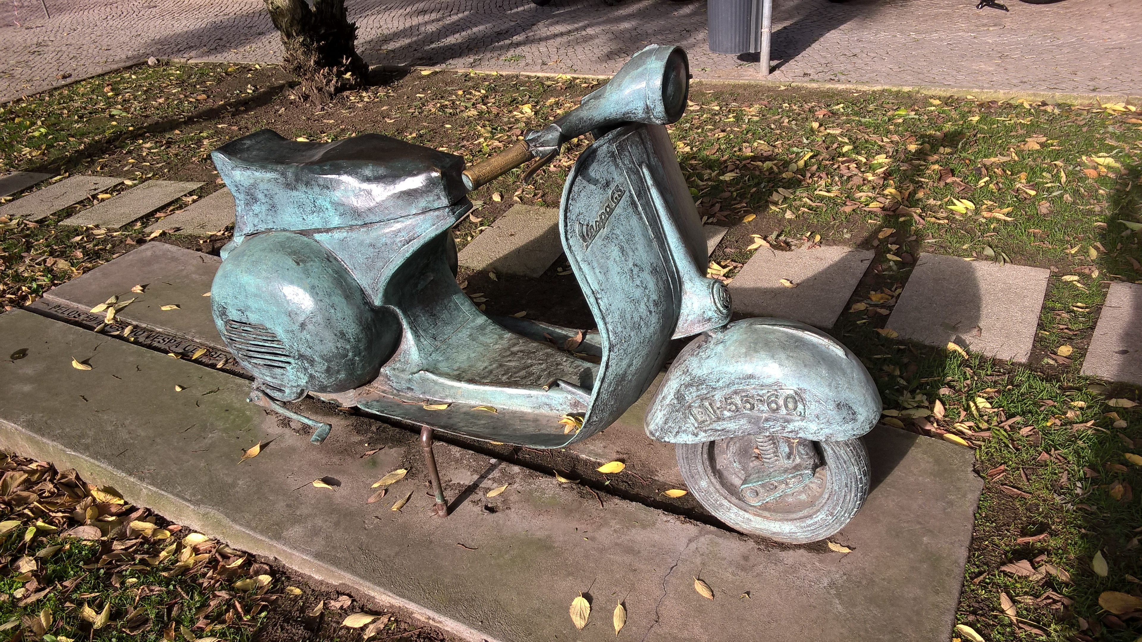 Estátua de Vespa, homenagem da Piaggio Portugal e da Câmara Municipal de Lisboa "Pelos 50 anos do Vespa Club de Lisboa"